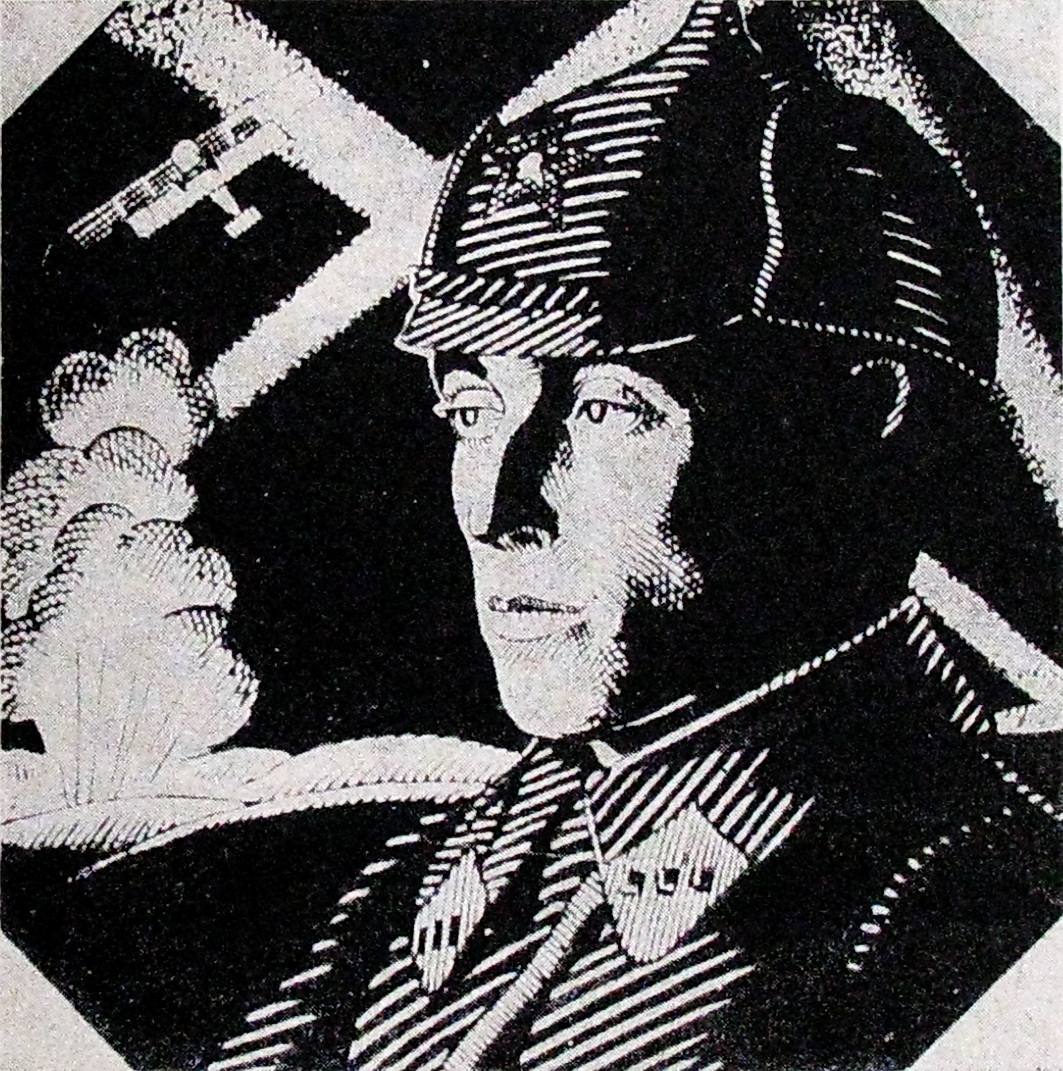 Аркадзь Астаповіч. Чырвонаармеец (магчымы аўтапартрэт А. Астаповіча). Пяро, туш.